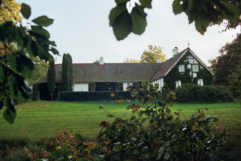 Norra fasaden